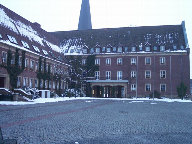 Dülmener Rathaus mit Marktplatz, eigenes Foto, GFDL